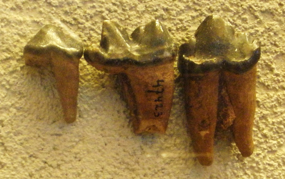 Fossil of Pliocrocuta, an extinct hyaena - Took the photo at Naturalis museum, Leiden